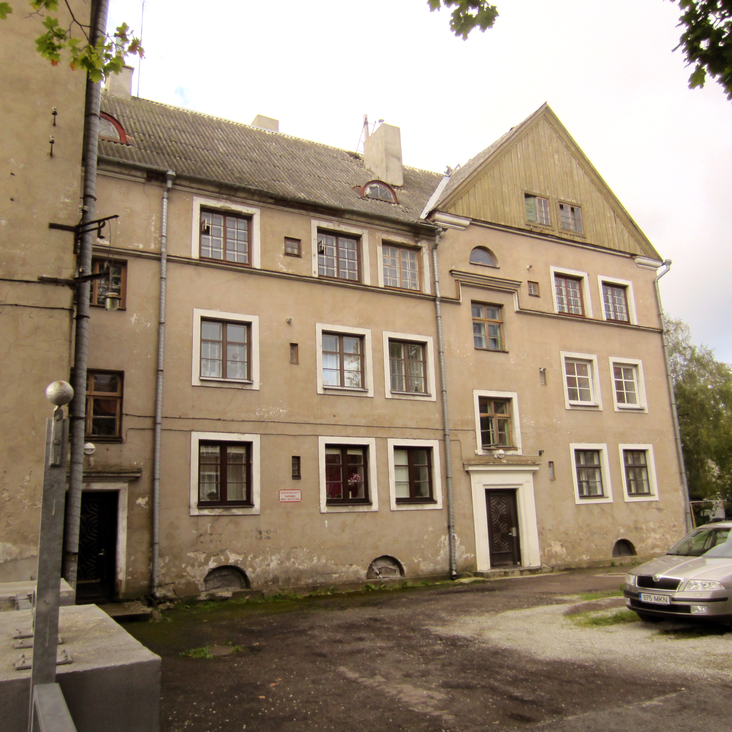 Elamu Mulla tn 2, Tallinn, vaade hoovist